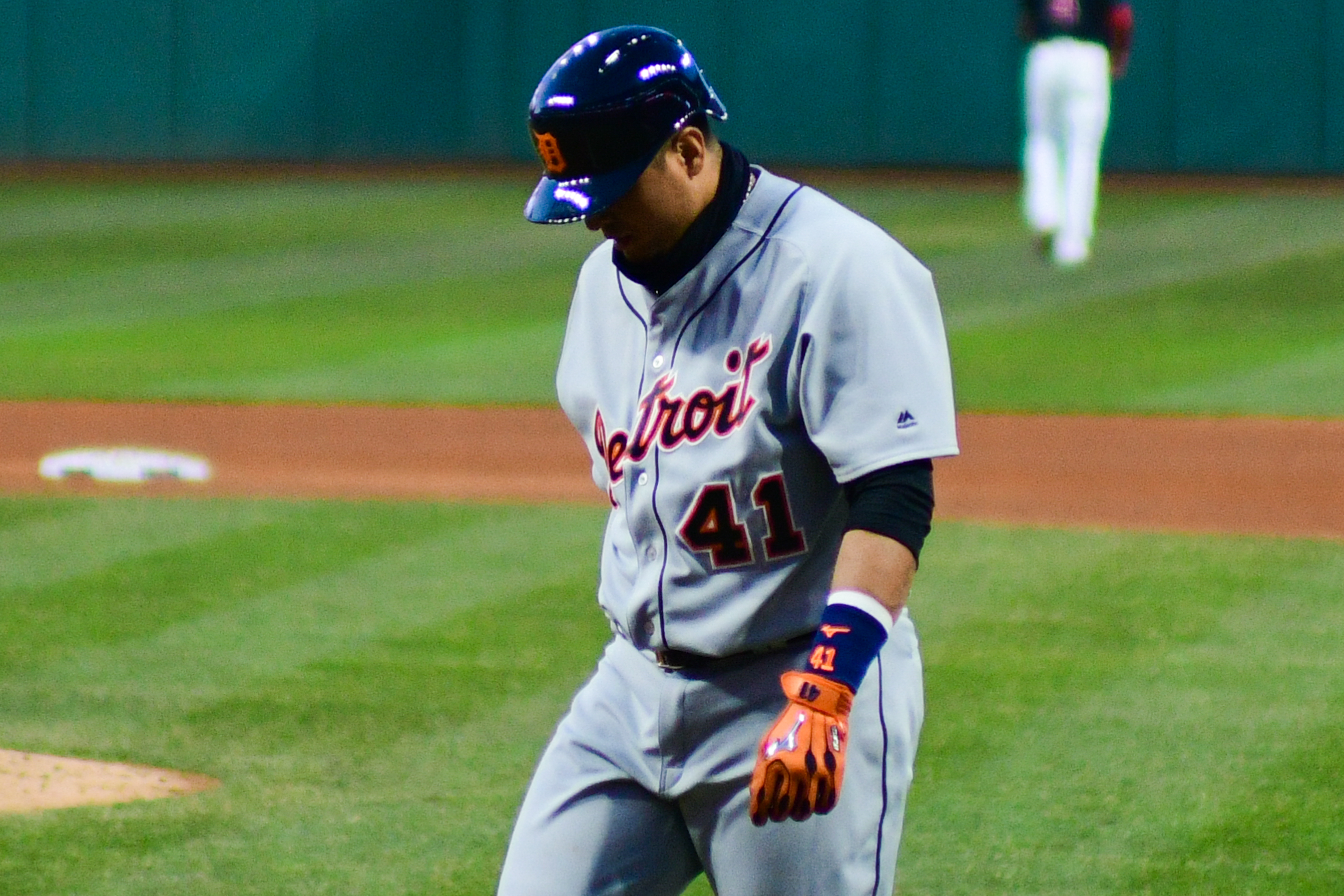 Victor Martinez